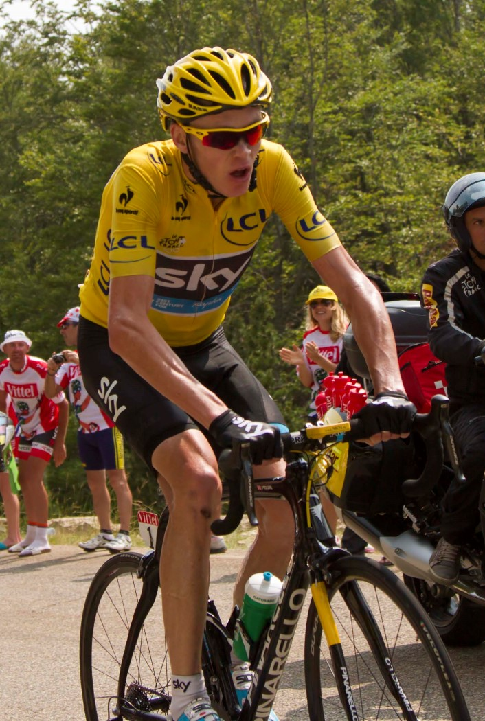 025 froome en contador